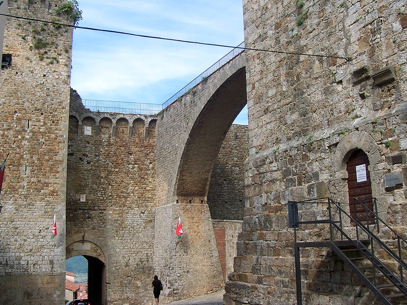 Massa Marittima - Fortezza Senese